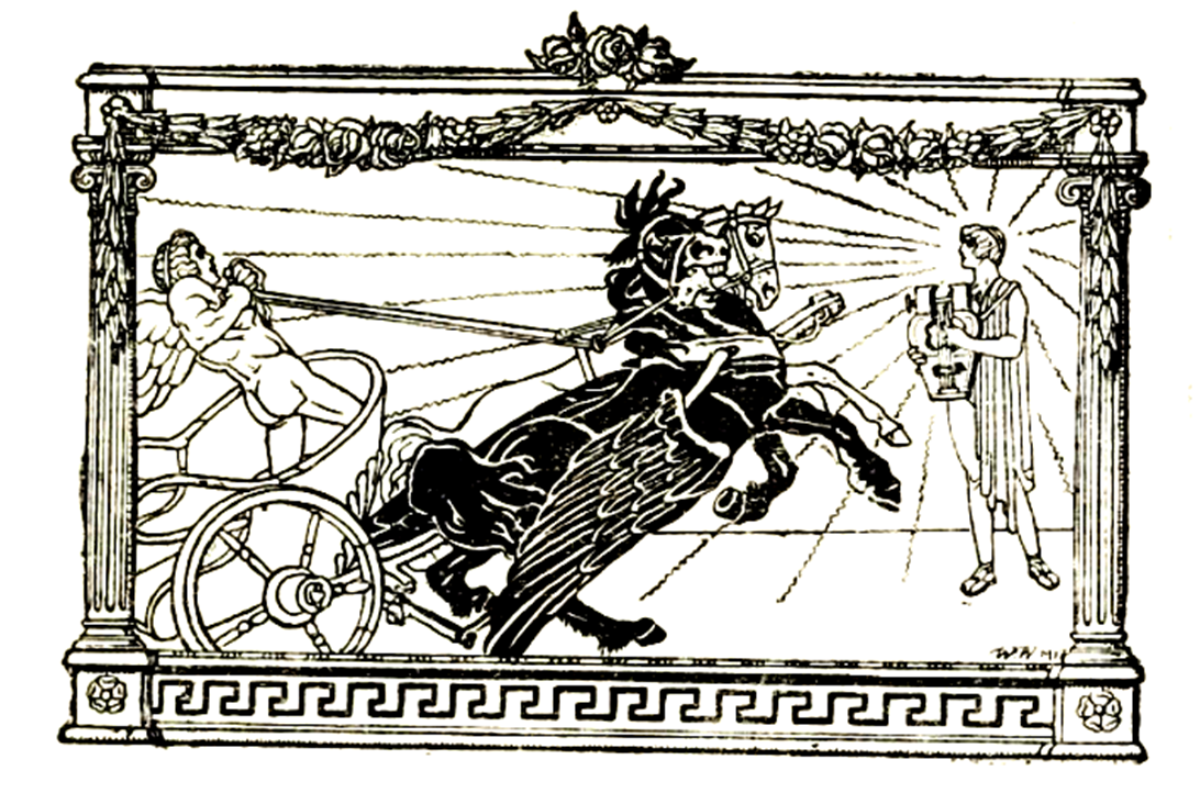 Ilustracja z książki